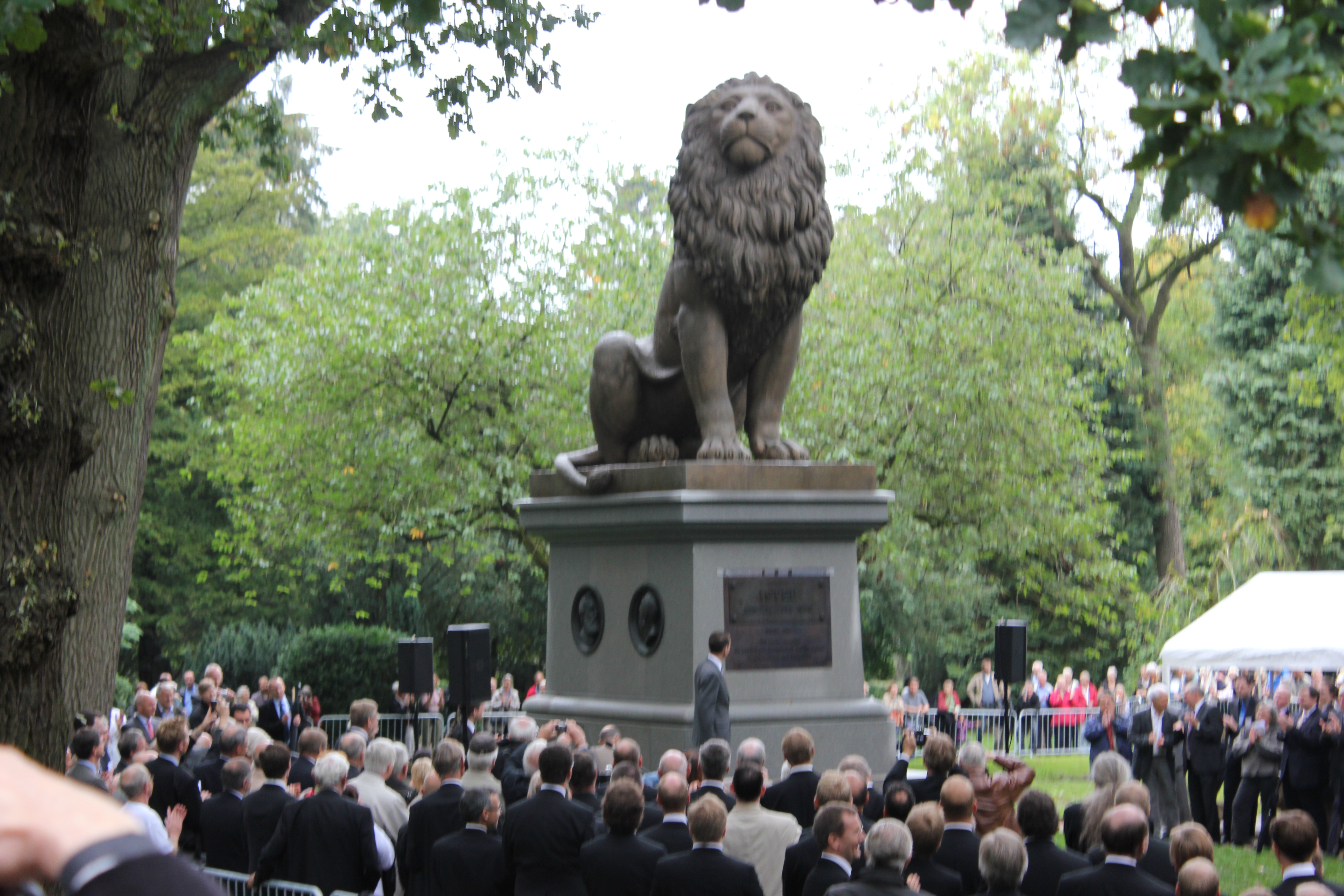 Prince Joachim of Denmark is looking to the memorial plaque which he had revealed, seconds before.